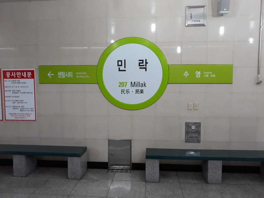 부산 도시철도 2호선 민락역 장산 방면 역명판